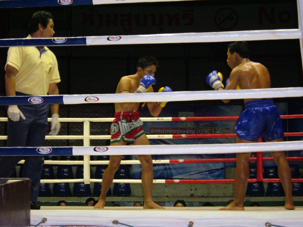 A Muay Thai match at Rajadamnern Stadium in Bangkok, Thailand.